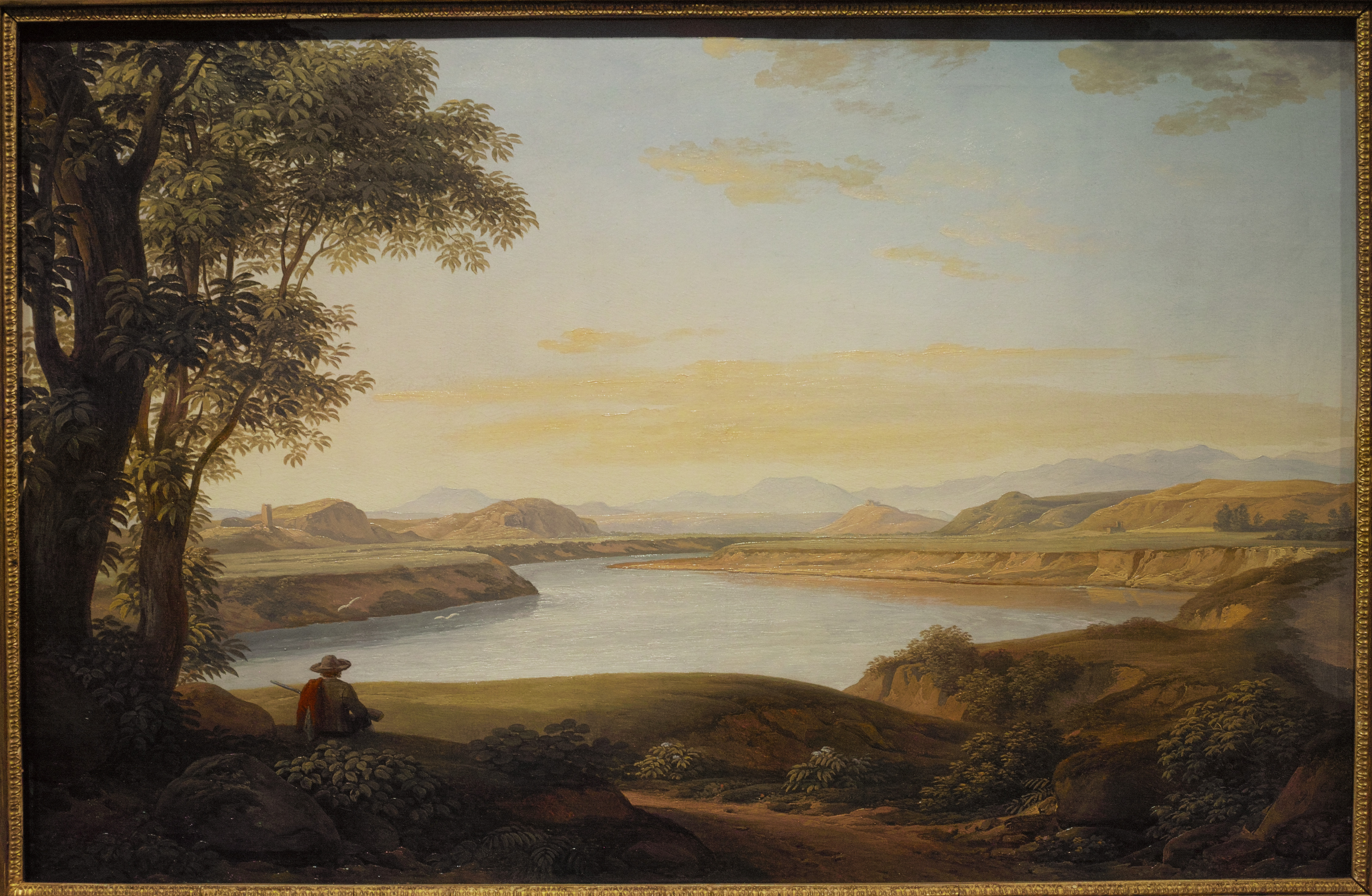 Hamburger Kunsthalle: Johann Christian Reinhart, 1761 - 1847. Ansicht des Tibers an der Quelle von Acqua Acetosa mit Blick auf Fidenae [View of the Tiber and Fidenae at the Acqua Acetosa Spring] 1808. Öl auf Karton auf Leinwand [Oil on cardboard, laid down on canvas]. Erworben 2003. Dauerleihgabe der Stiftung für Hamburger Kunstsammlungen.